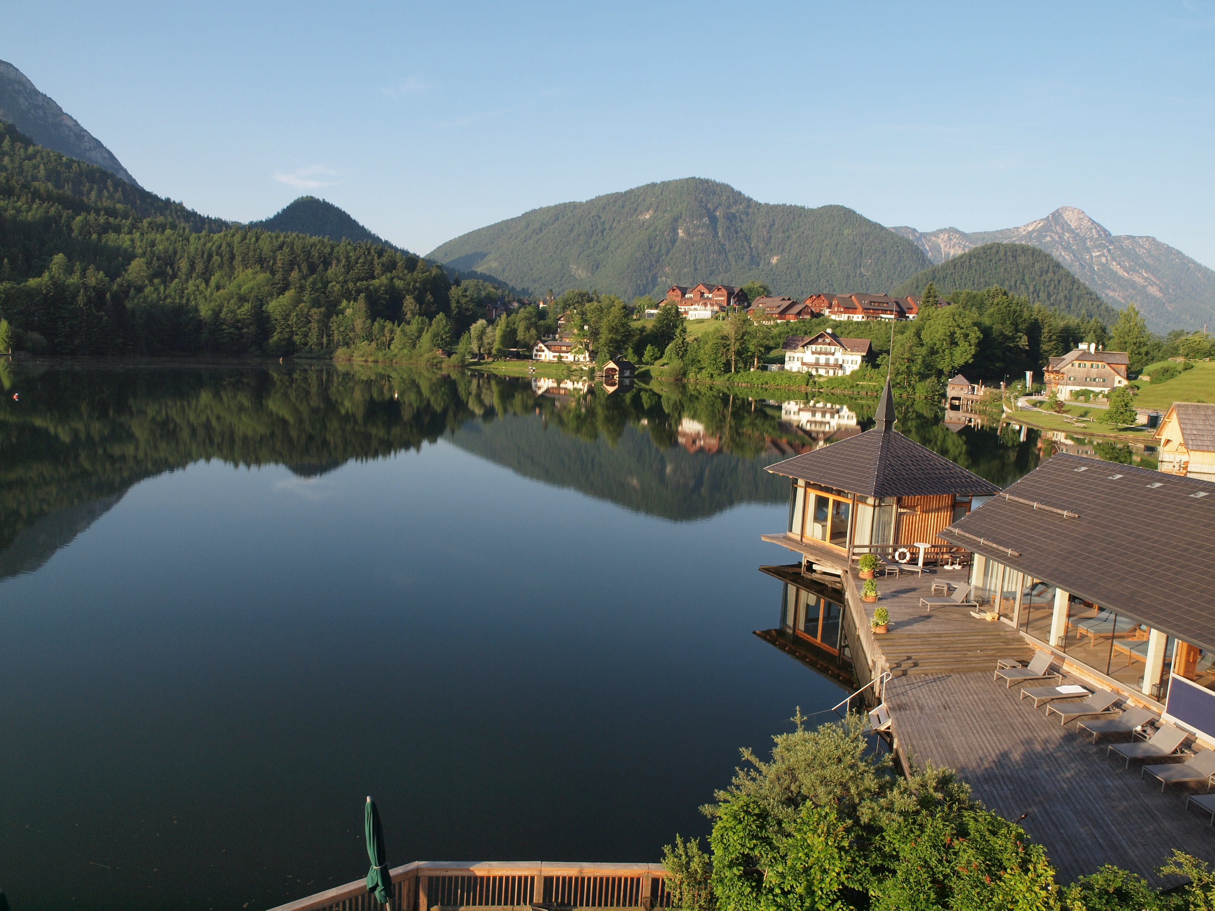 Blick aus einem Hotelzimmer früh am Morgen..